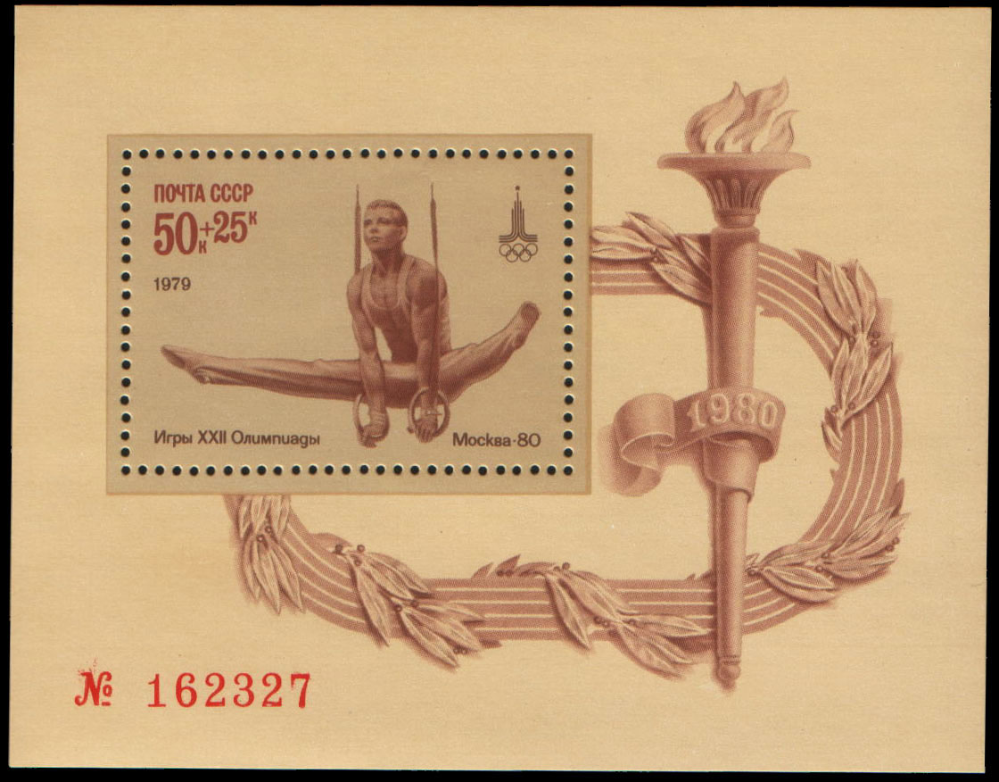 Почтовый блок СССР из серии «XXII летние Олимпийские игры 1980 года в Москве. Спортивная гимнастика», выпущенный 21 марта 1979 года. На марке изображено упражнение на кольцах, на полях блока — дорожки стадиона, обвитые лавровыми ветвями, олимпийский факел, номер. Художник — И. Сущенко, номер — 4952 (ЦФА). Тираж — 700 тыс. экз. Согласно книге Н. Кочеткова «О чём умолчали каталоги», М., 2006, марка создана по фотографии Д. Маркова «Николай Андрианов выполняет упражнение на кольцах», опубликованной в журнале «Спортивная жизнь России», № 10, 1972 год.